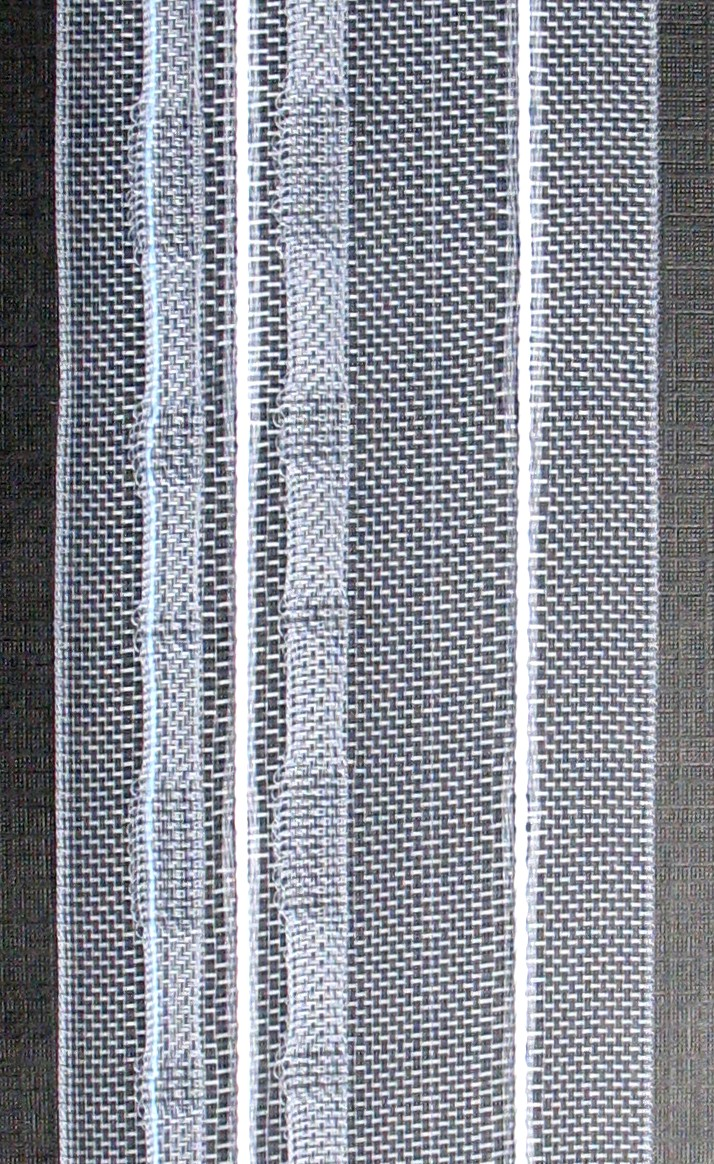 Gardinenband (5 cm breit)